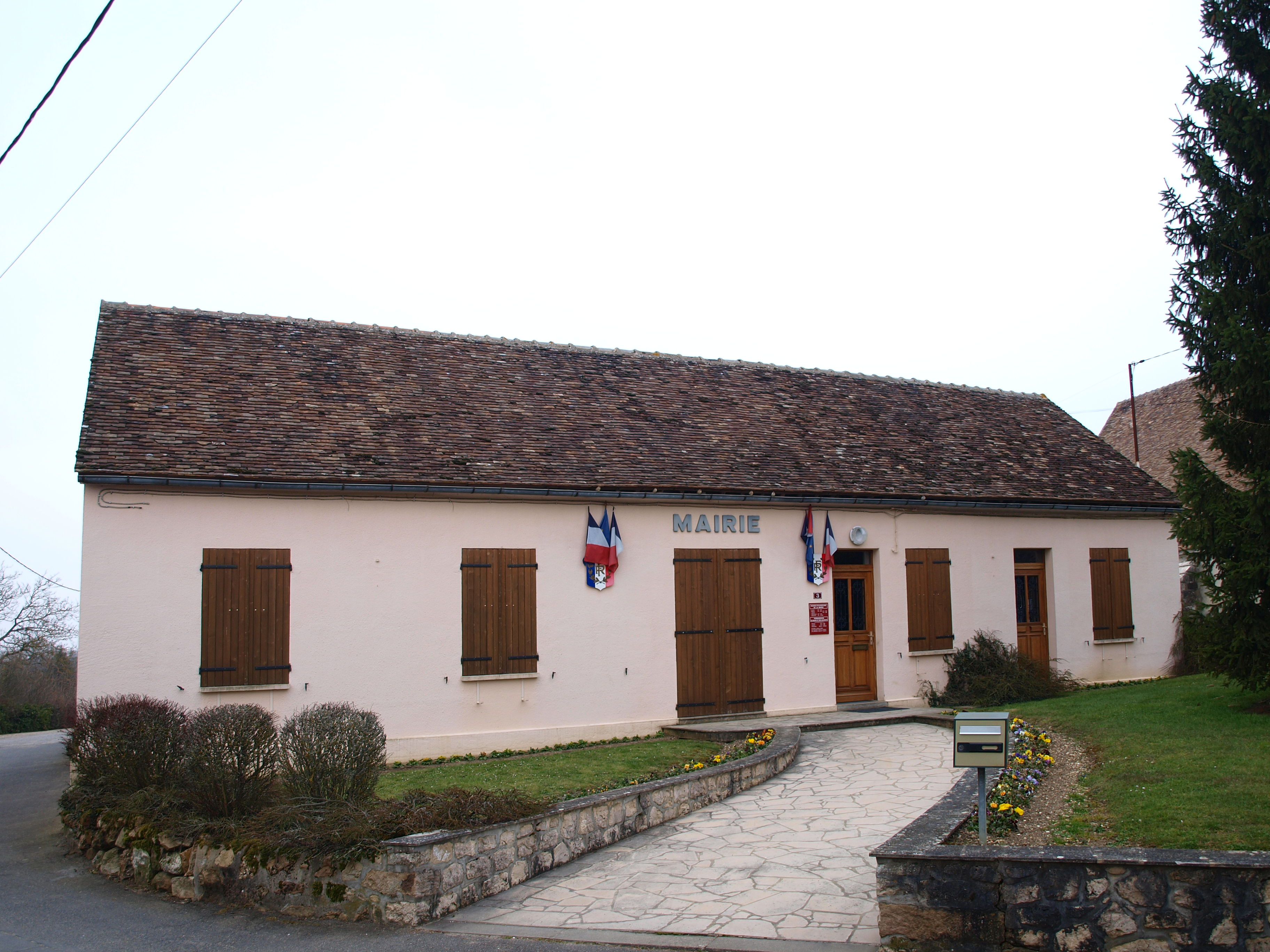 Bazoches-sur-le-Betz (Loiret, France) ; mairie.